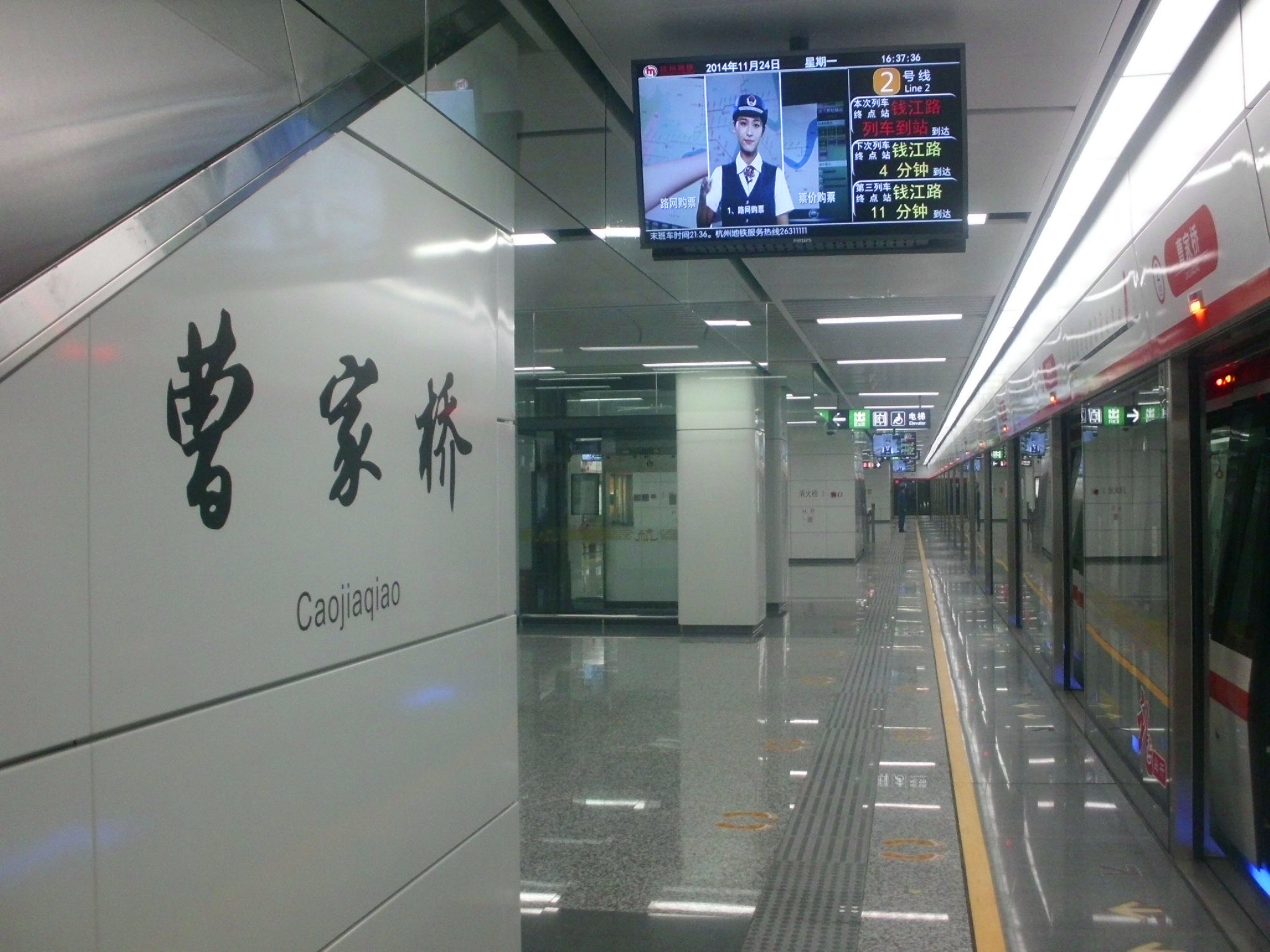 2号线曹家桥站